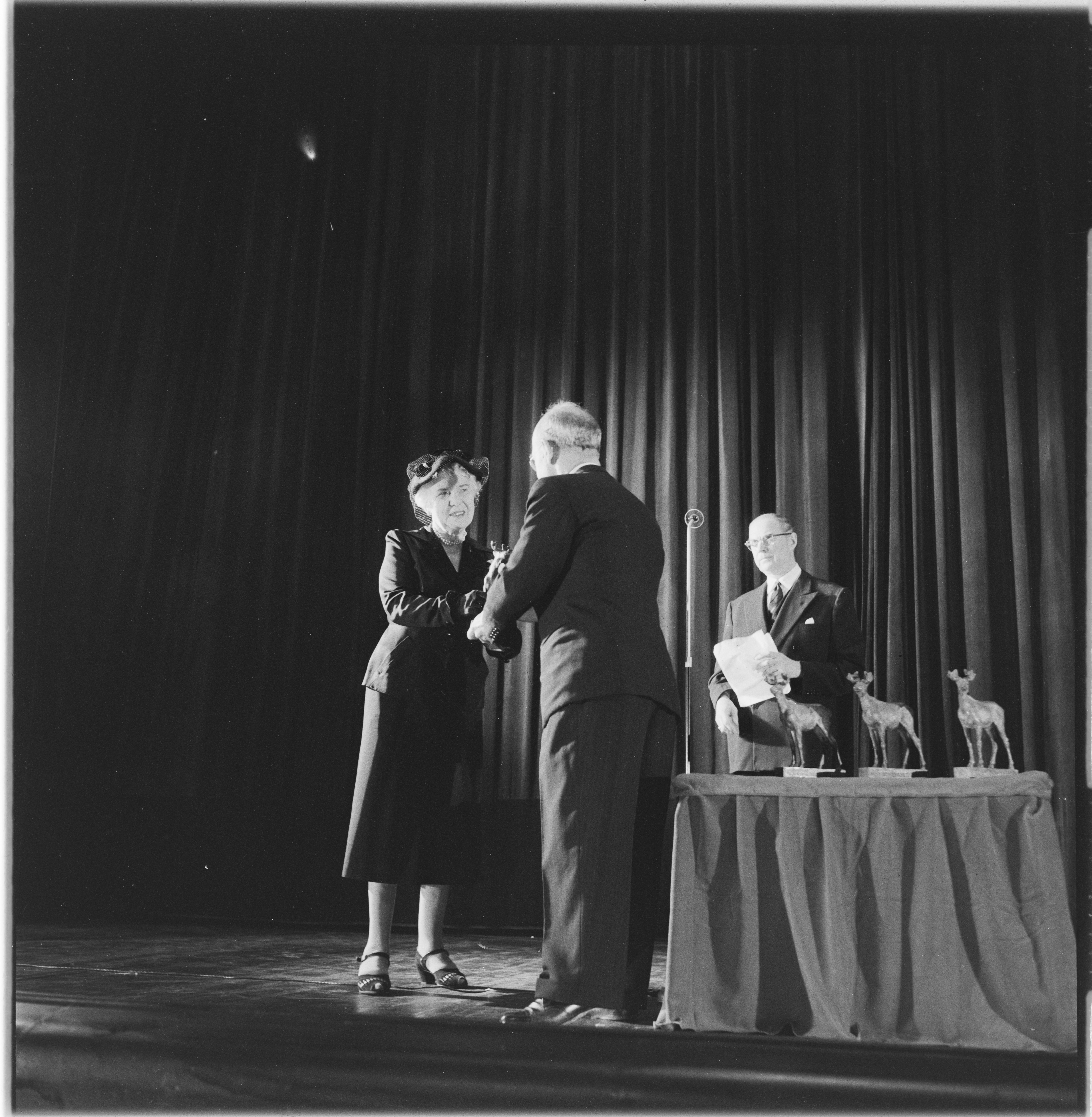 Bildet er hentet fra Arkivverket. Aamot-prisen til Kr. Aamot, Tancred Ibsen, Alfred Maurstad og Kåre Bergstrøm. NÅ nr. 43, 1955. Arkivinstitusjon : Riksarkivet Arkivnavn : Billedbladet NÅ Sted : Norge, Oslo, Oslo, Klingenberg kino Emneord: prisutdeling Avbildet: Doris Aamot mottar Aamot-statuetten på vegne av sin mann Kristoffer Aamot. Han ble posthumt tildelt prisen for sin årelange innsats for norsk filmproduksjon, og prisen ble også oppkalt etter ham